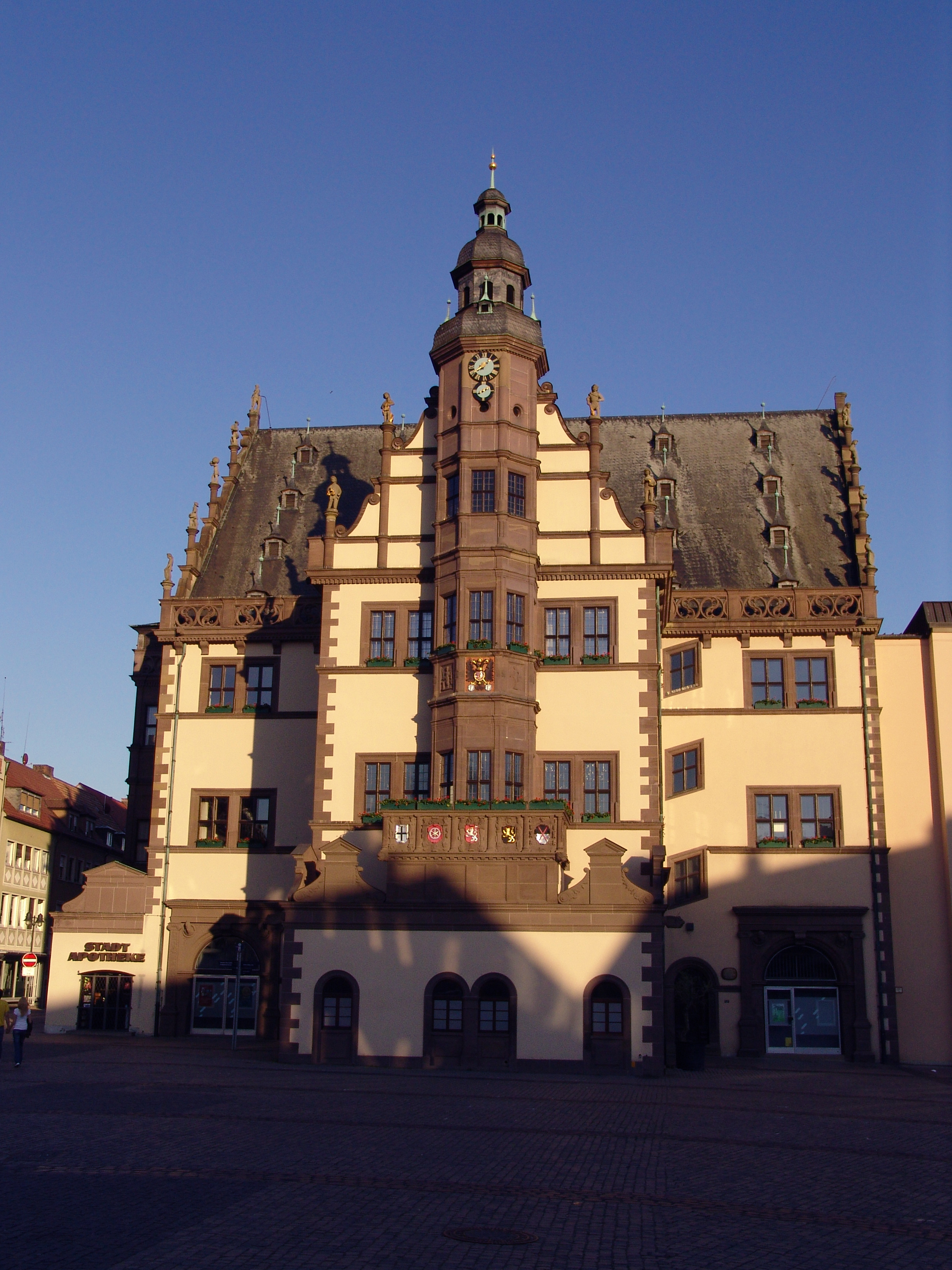 Schweinfurt - Rathaus